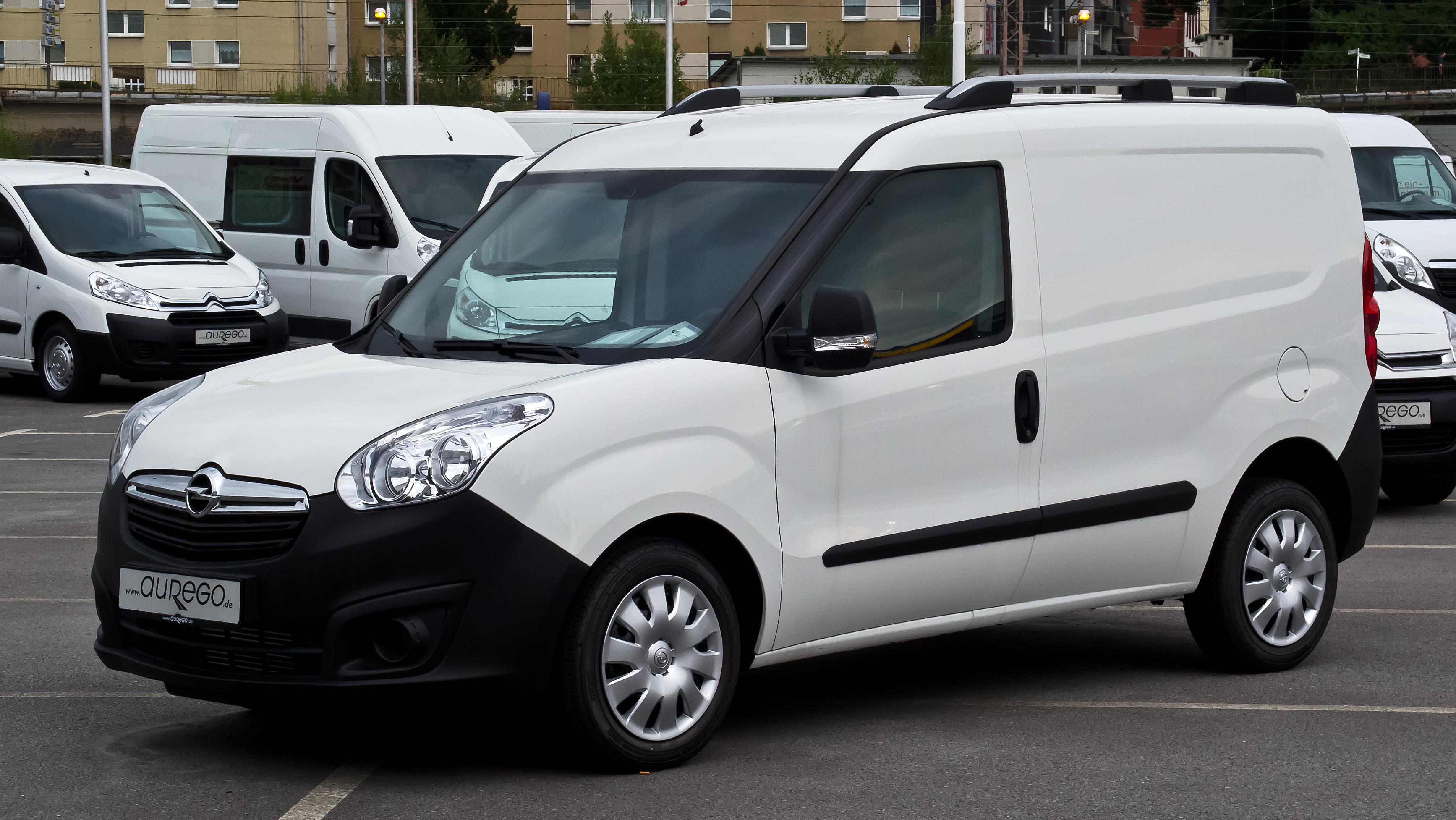 Opel Combo Kastenwagen 1.6 CDTI (D)